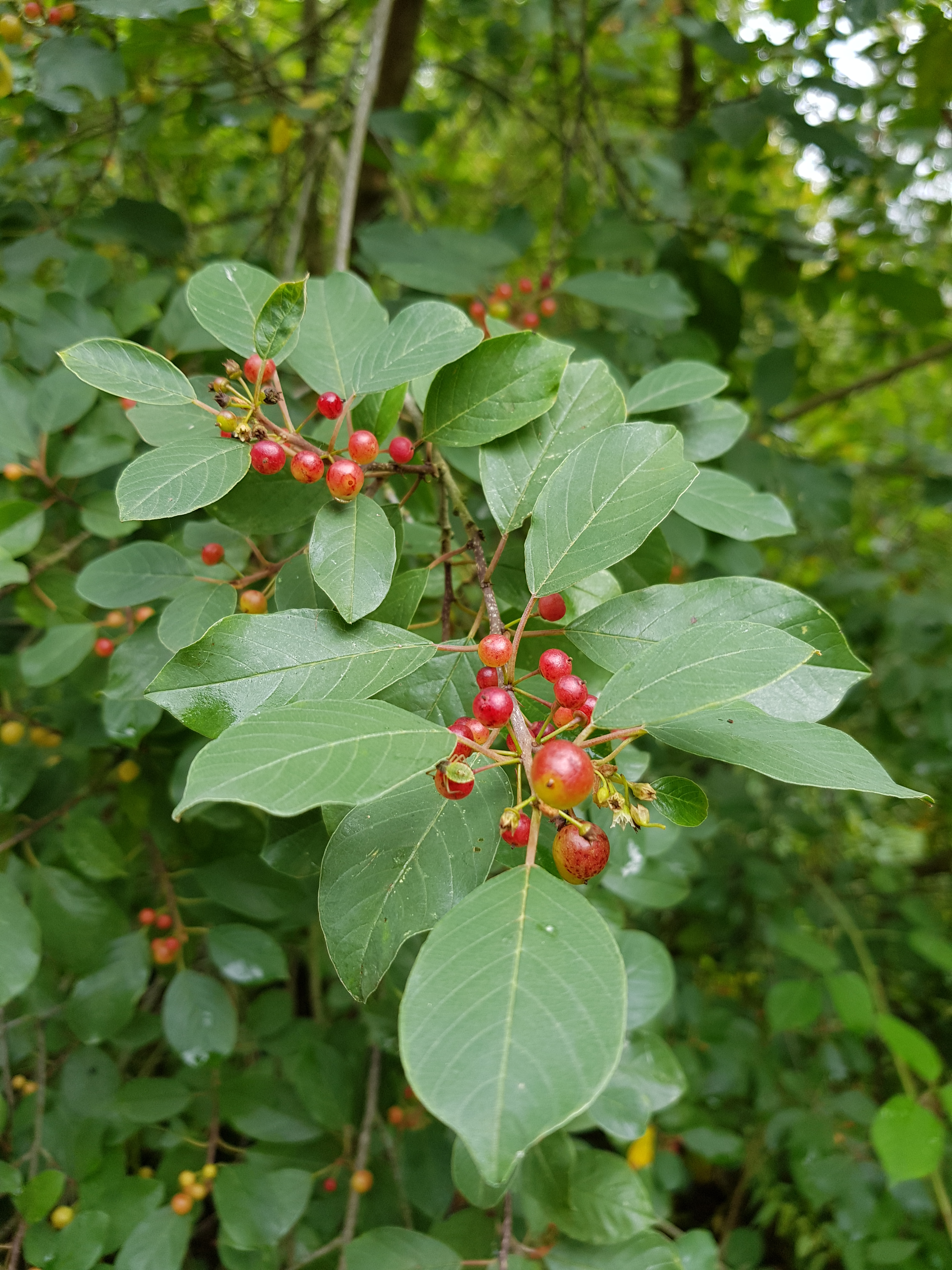 Bourdaine